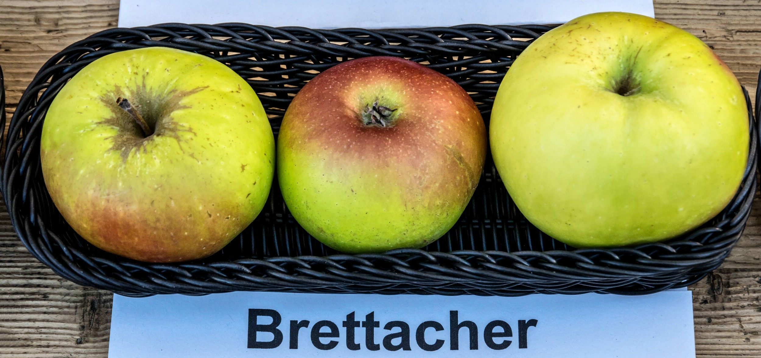 Alte Apfelsorten, von denen es im Badischen noch tragende Bäume gibt. Alle Aufnahmen au dem Oktober 2015